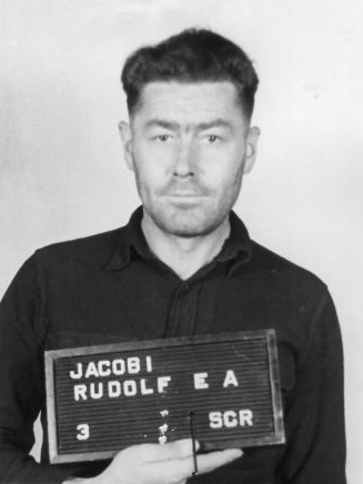 Haftbogenfoto des Angeklagten Rudolf Ewald Arnold Jacobi (14.7.1910 in Arnstadt - 29.7.1974 in Hattingen), SS-Oberscharführer im Konzentrationslager Buchenwald und Mittelbau-Dora, im Dachauer Dora-Prozess ("Case No. 000-50-37 Dora") am 30.12.1947 zu lebenslanger Haft verurteilt.